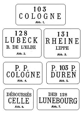 Ortsstempel nach französischem Vorbild in den von Frankreich besetzten Gebieten zwischen 1798 und 1813